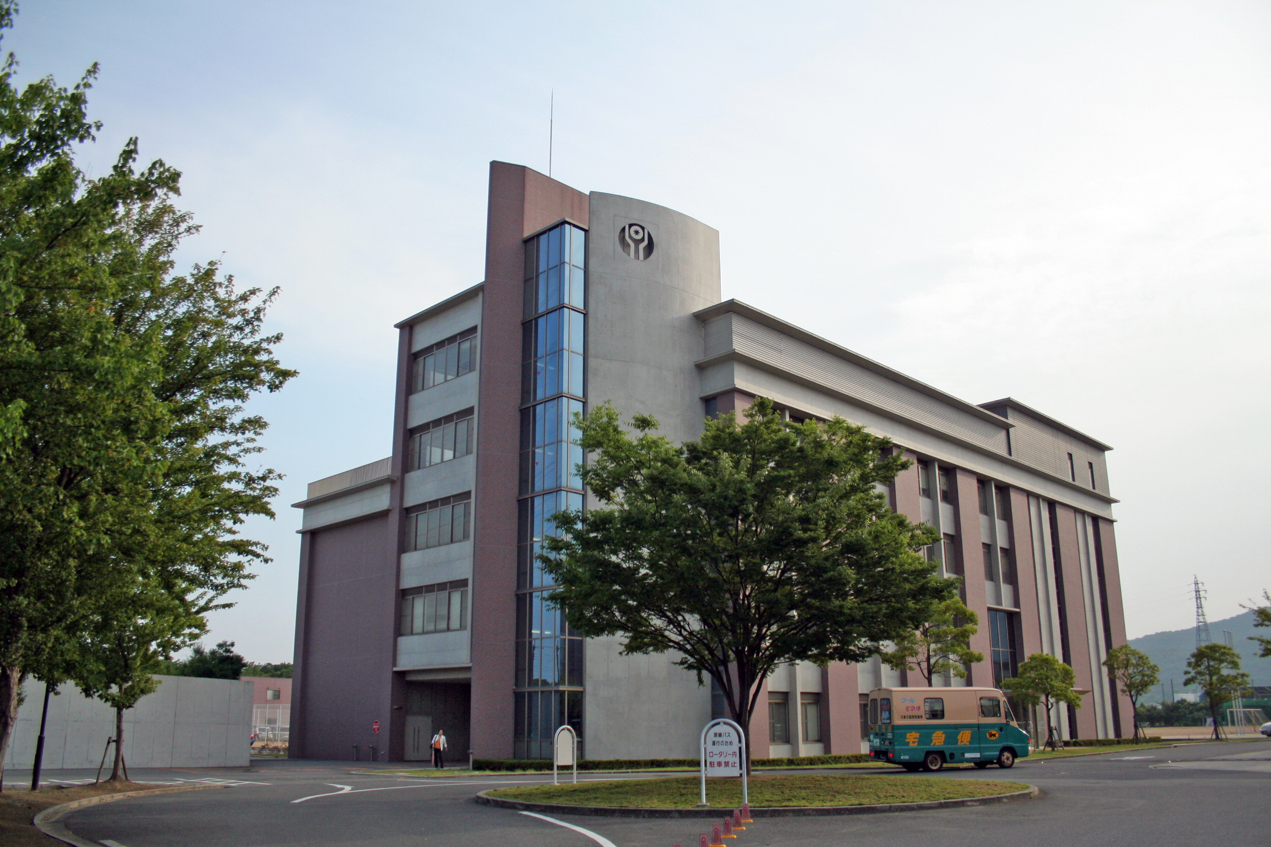 関西福祉大学とその周辺の風景。 看護棟。